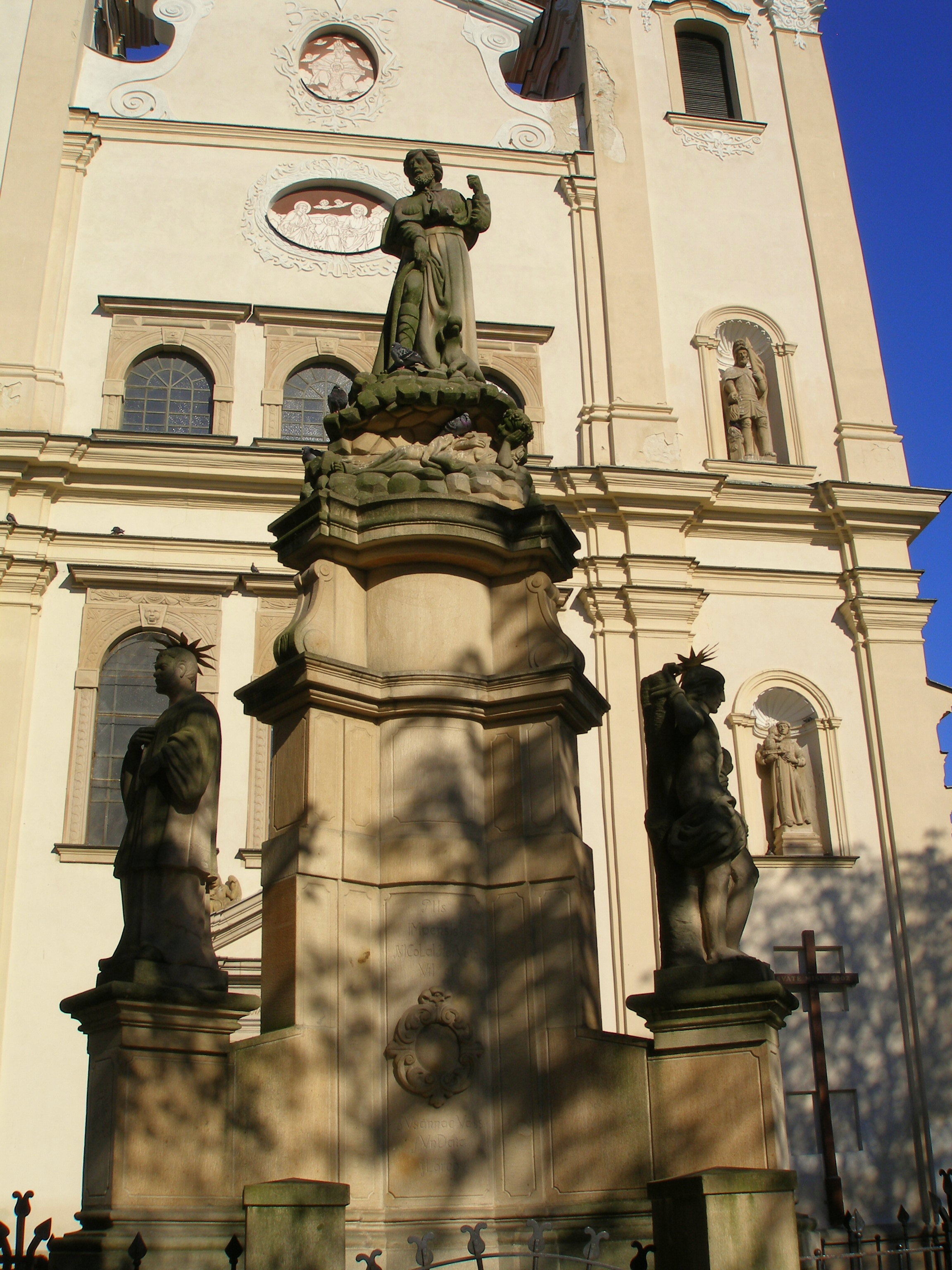 Súsošie sv. Róchusa na Františkánskom námestí v Prešove. Súsošie svätého Rochusa. Autorom pieskovcového súsošia je Šimon Grimming. Pieskovcové súsošie sv. Róchusa bolo v r. 1730, resp.1733 umiestnené na voľnom priestranstve pred kostolom.Súsošie bolo úplne dokončené až v r. 1795. Ďalšia renovácia súsošia sa uskutočnila v r. 1843. Na obrázku sú zobrazené kópie plastiky vľavo sv. Jána Nepomuckého, vpravo sv. Sebastiána. Na vrchole je socha svätého Rochusa.